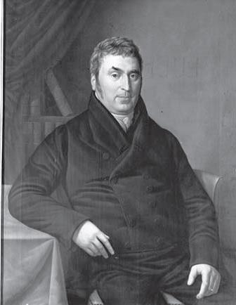 Porträt Matthias Ludwig Leithoff von Rudolph Suhrlandt, 1827 Ö/Lw. 110 x 80 cm Bez. u. r. R. Suhrlandt/1827 Inv. Nr. G. 354; MKK Lübeck